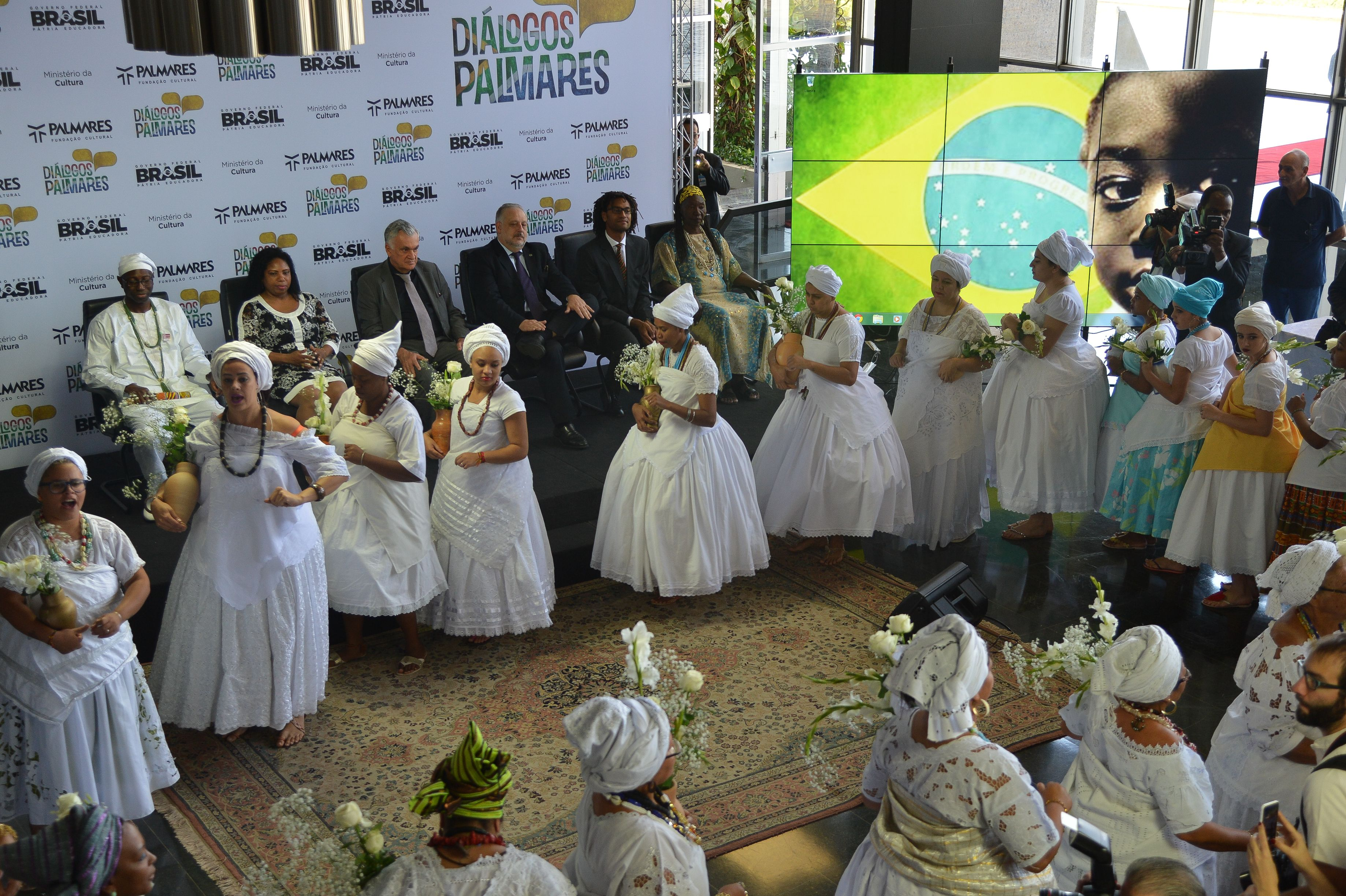 Os ministros da Cultura, Juca Ferreira, e das Comunicações, Ricardo Berzoini, participam das comemorações da Fundação Cultural Palmares, que completa 27 anos.